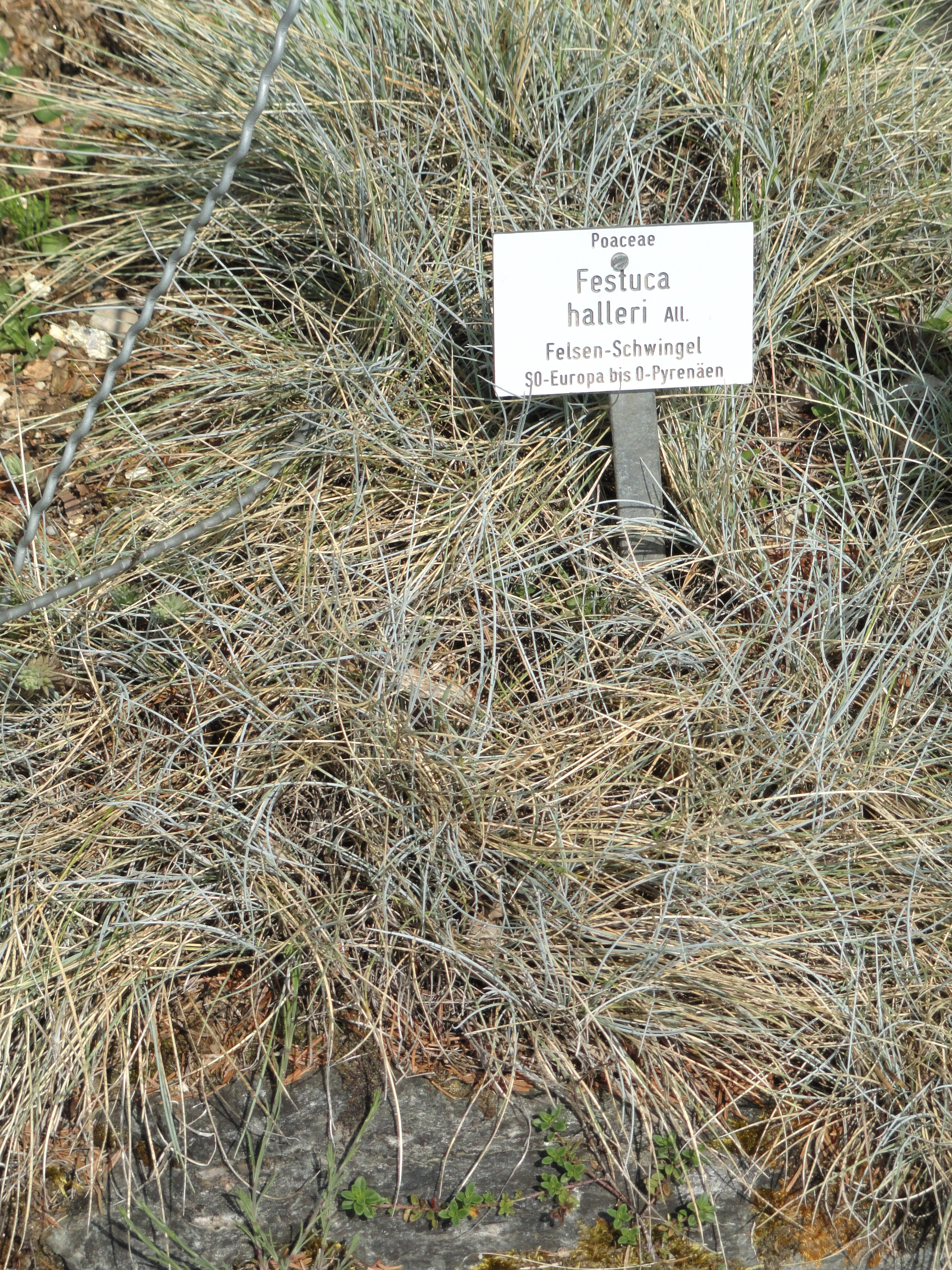 Festuca halleri specimen in the Botanischer Garten München-Nymphenburg, Munich, Germany.